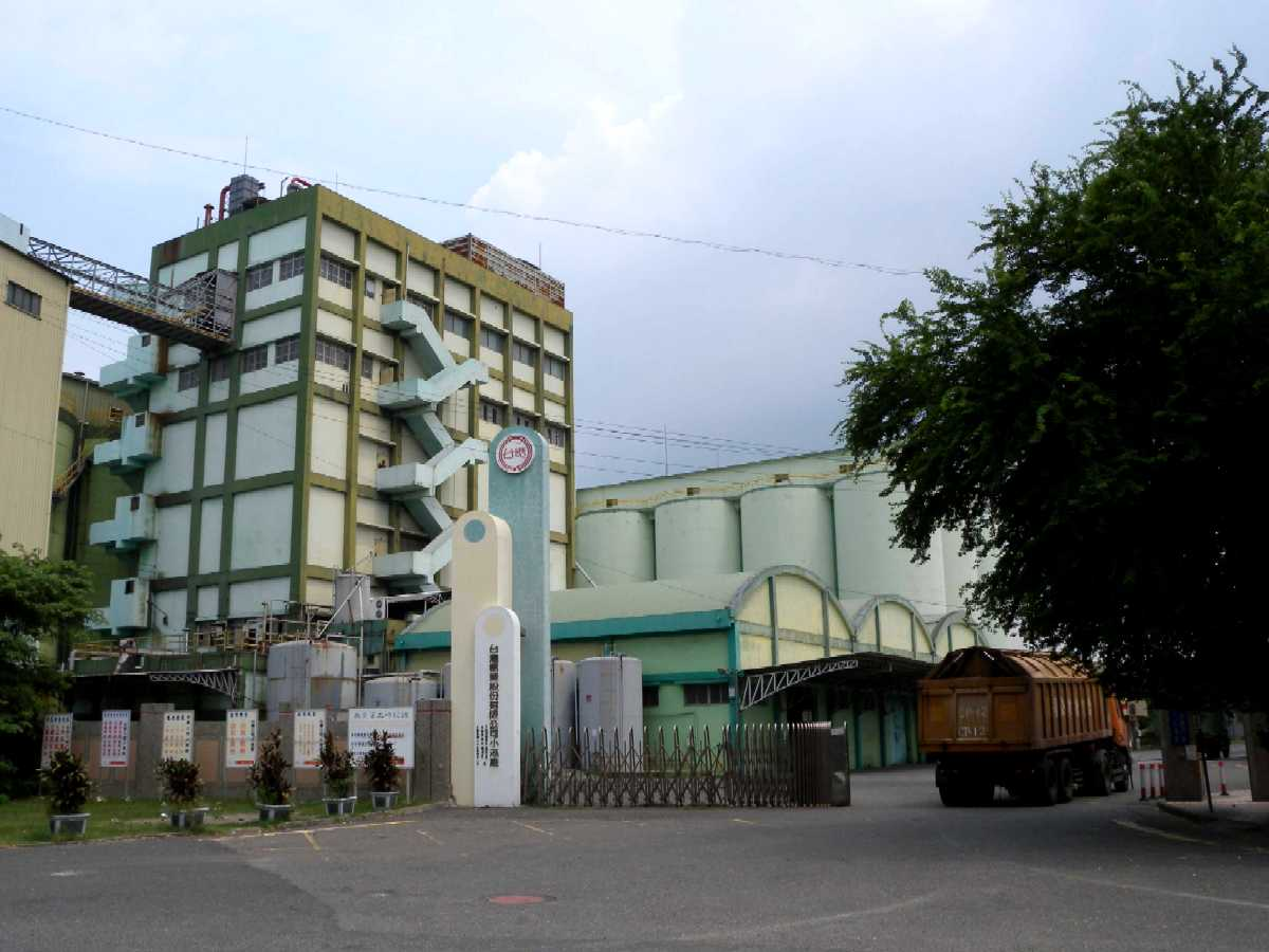 臺糖高雄小港廠。